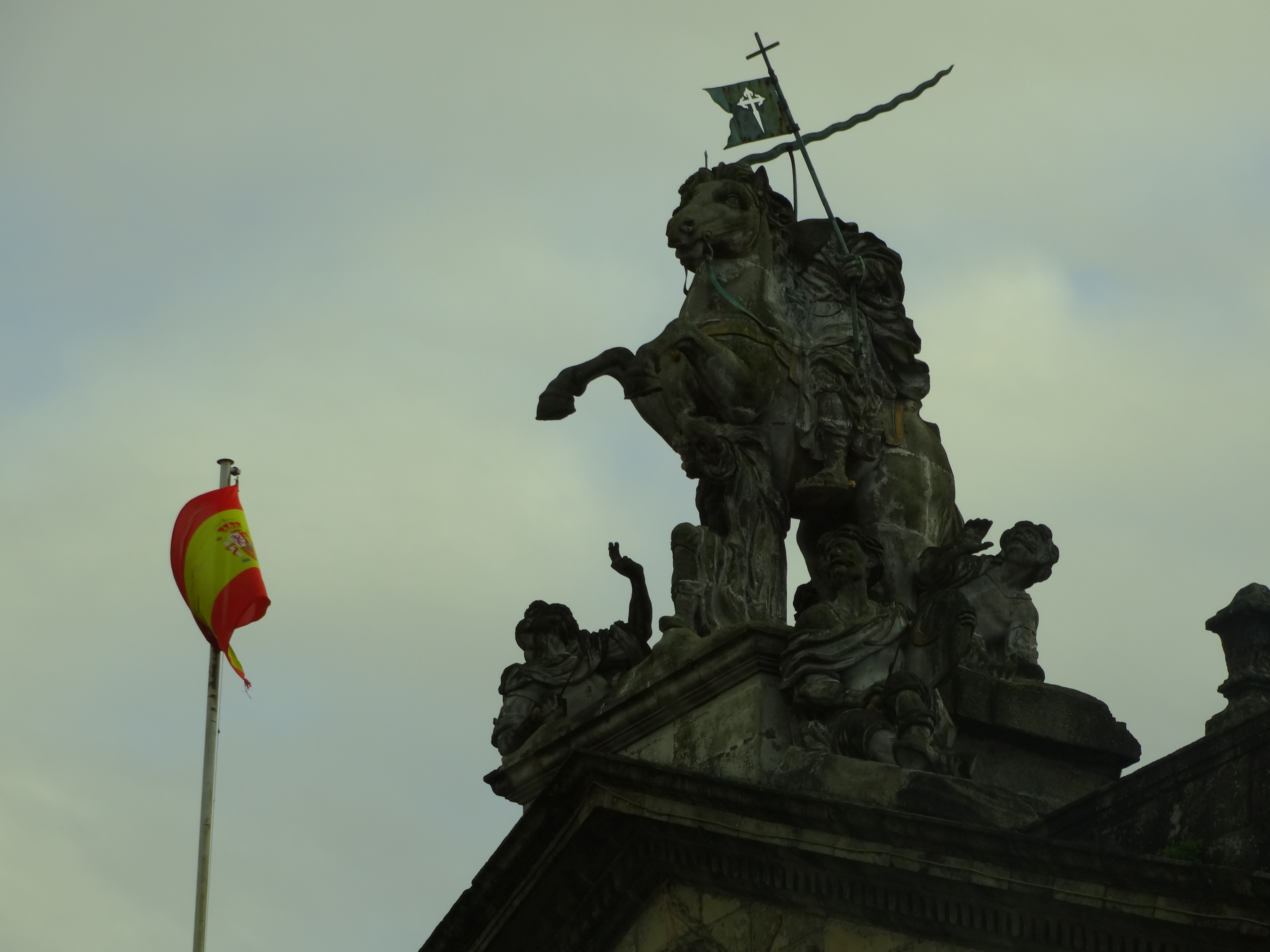 Palacio de Rajoy